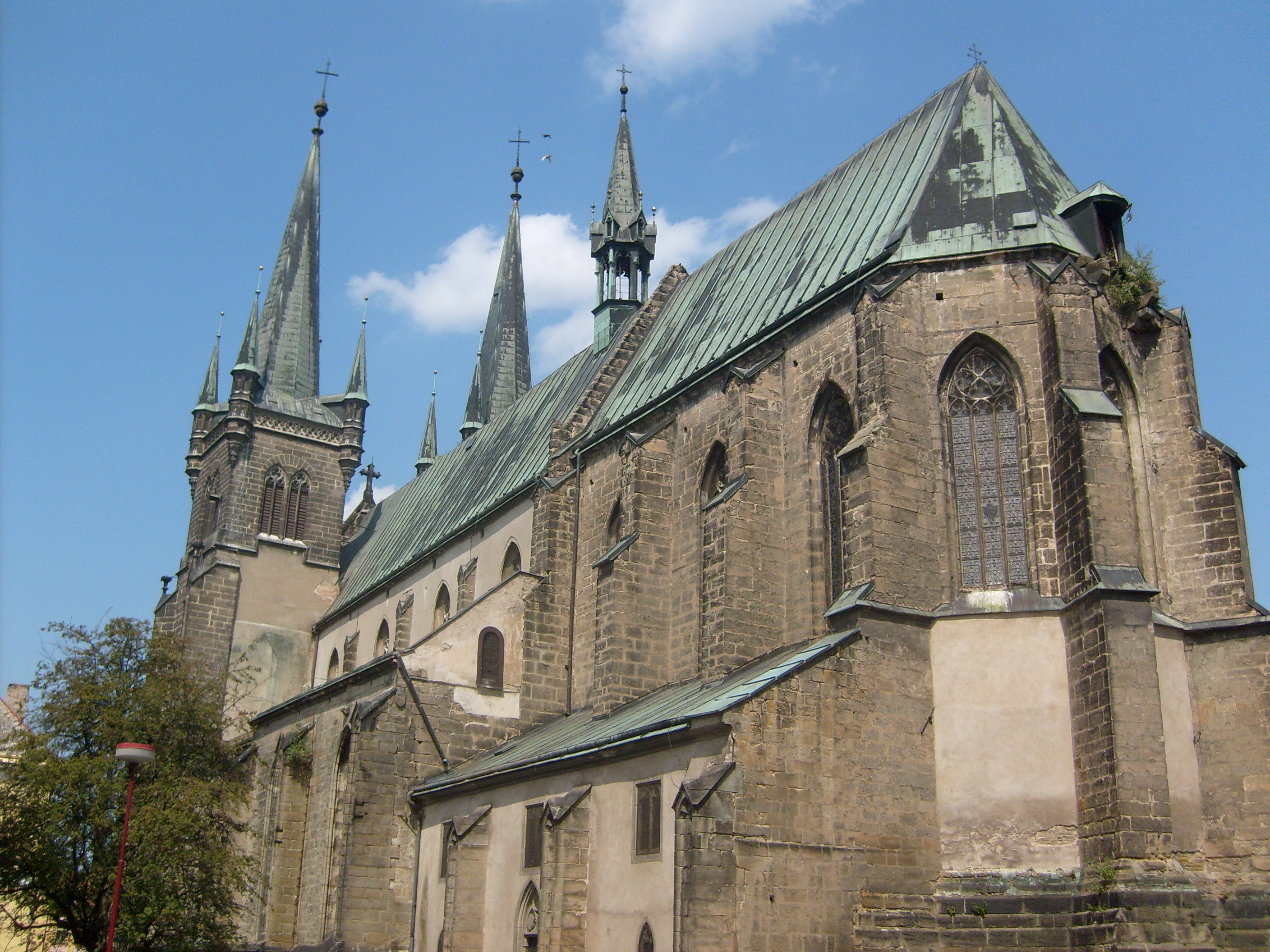 Kostel Nanebevzetí Panny Marie, Chrudim, Pardubice Region, Czech Republic